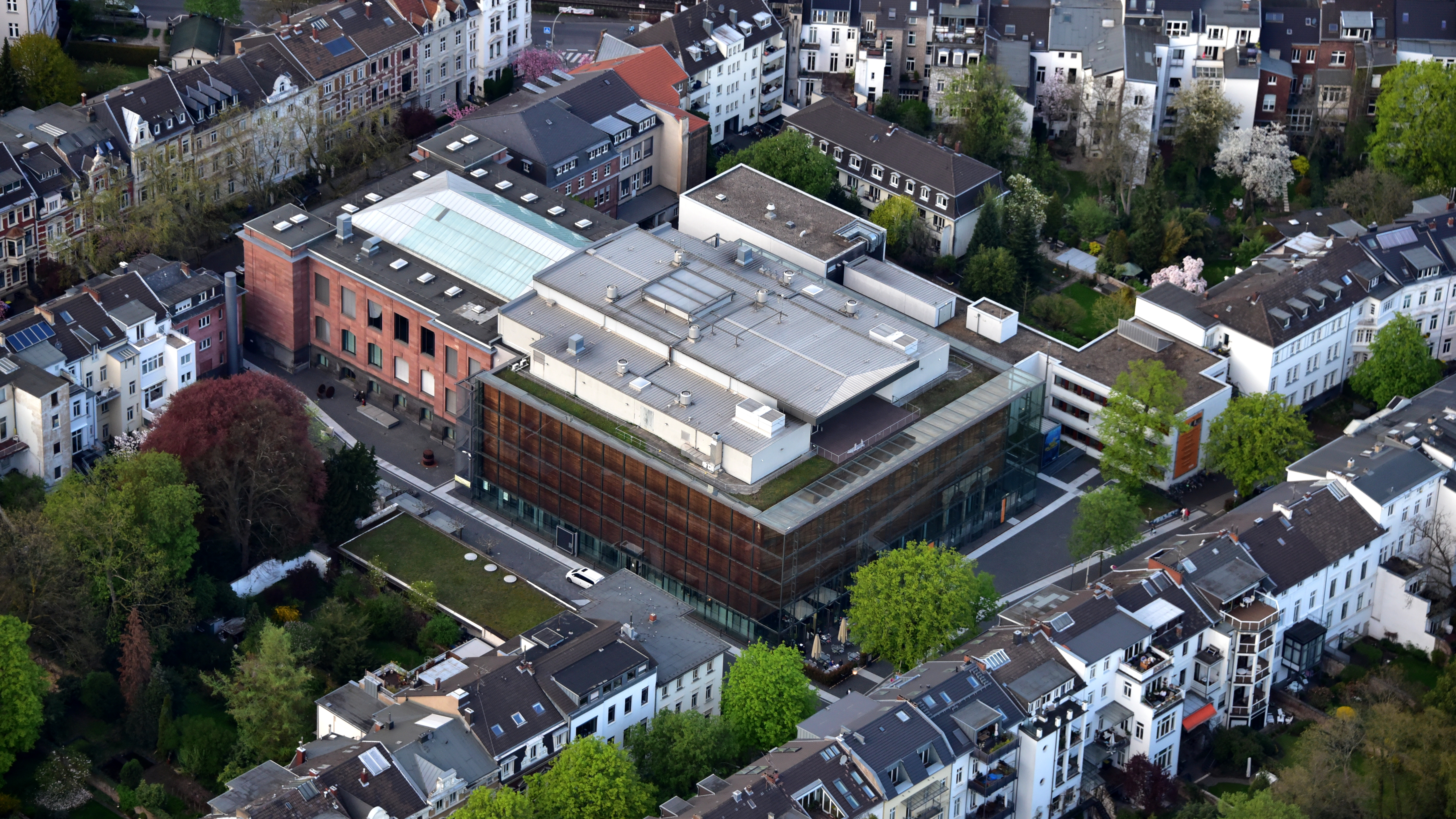 Rheinisches Landesmuseum Bonn, Luftaufnahme (2018)